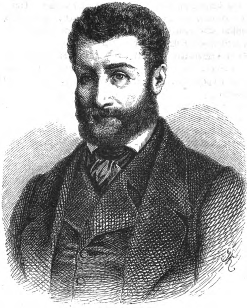 Claude Tillier, französischer Schriftsteller im 19. Jh.